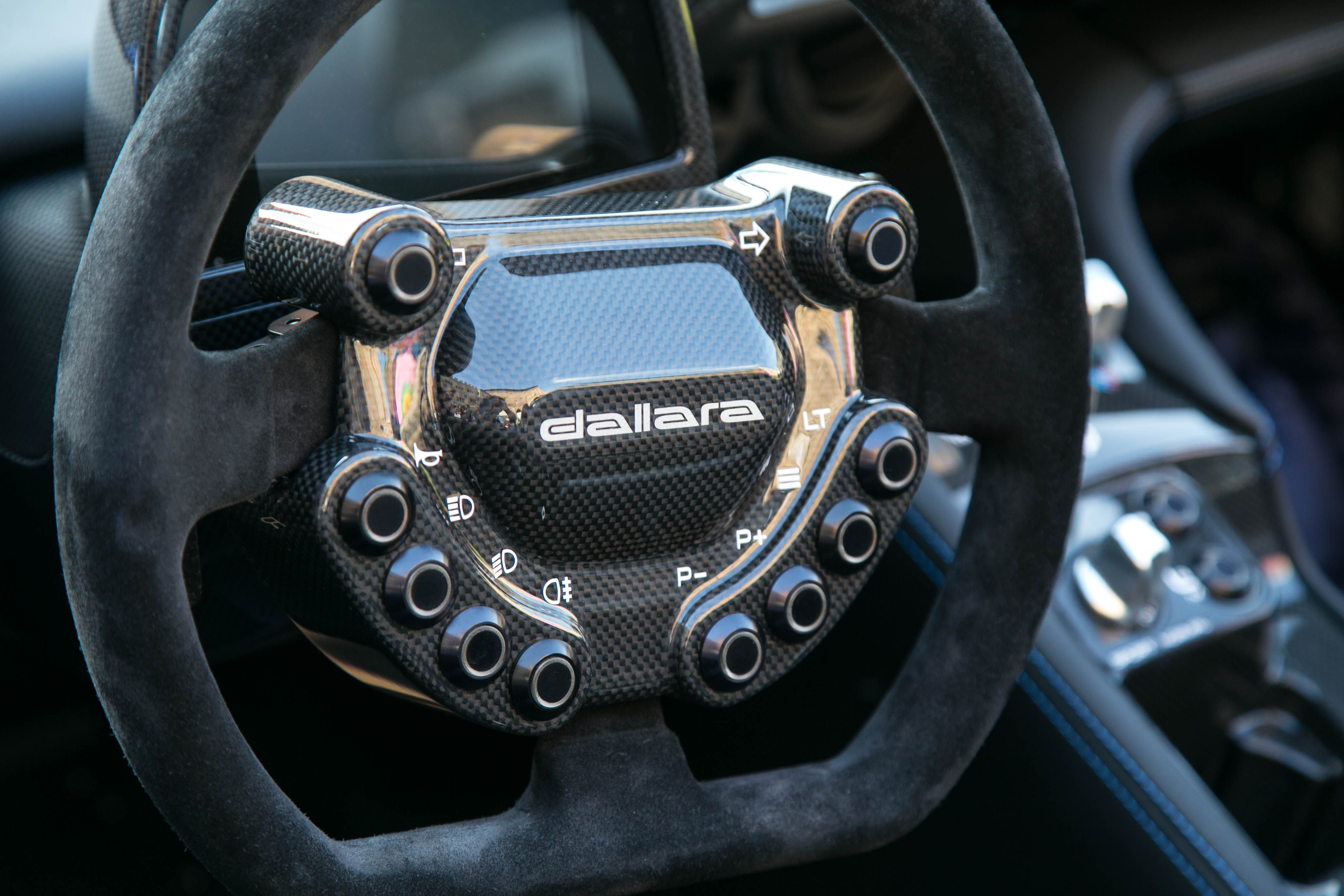 2018 05 18 Dallara Millemiglia-14